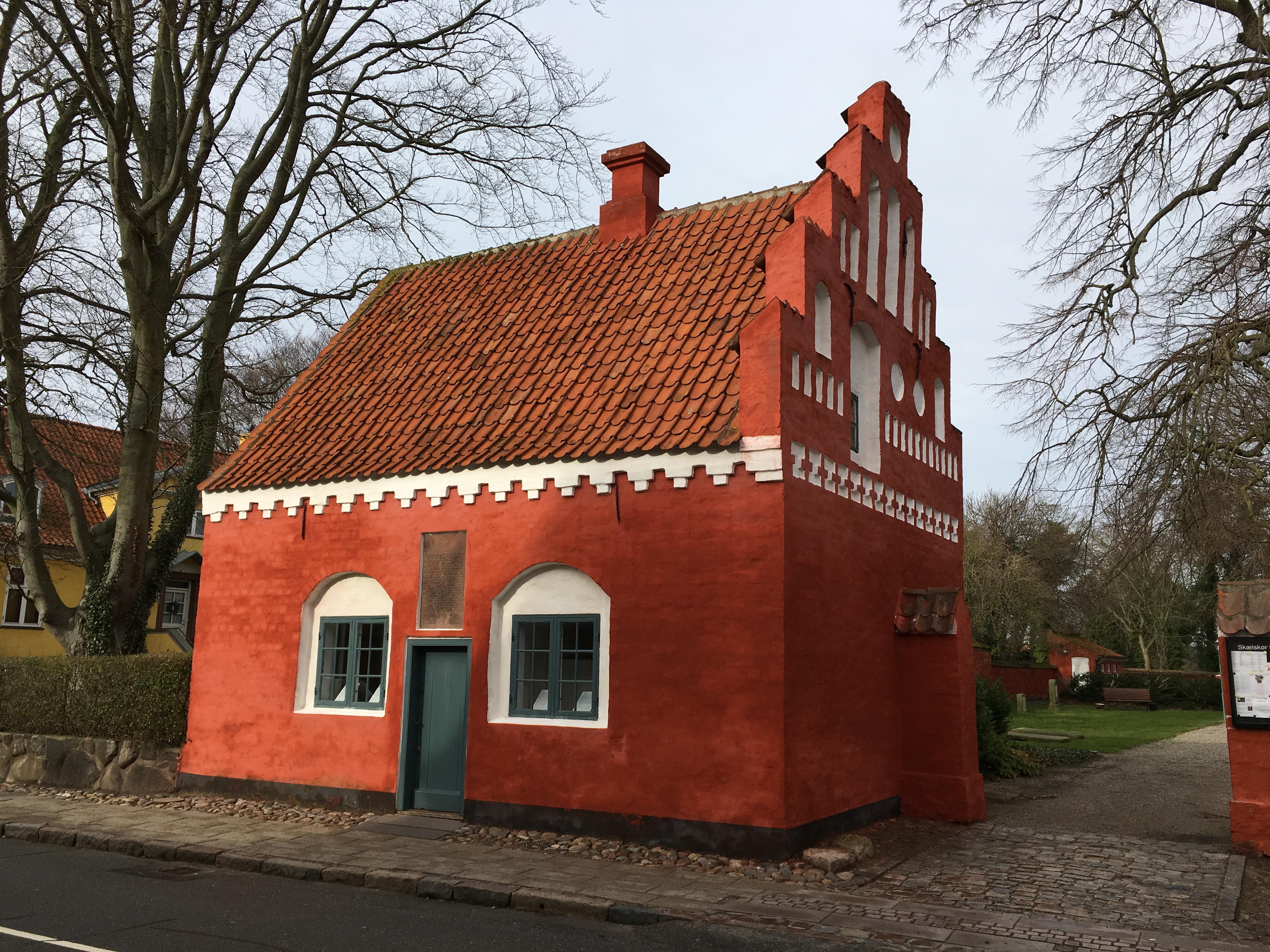 Latinskolen i Skælskør